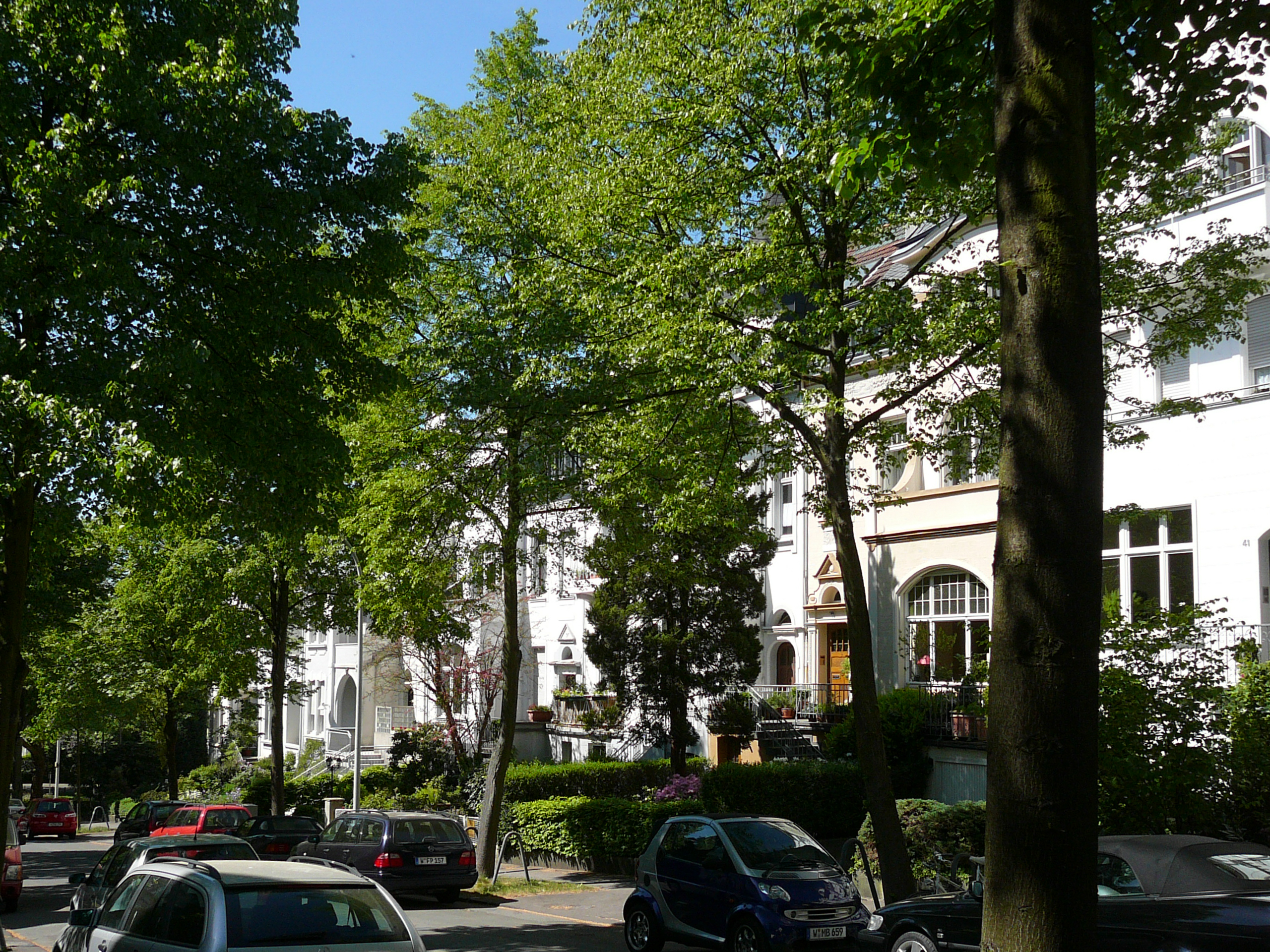 Wuppertaler Zooviertel, Wuppertal